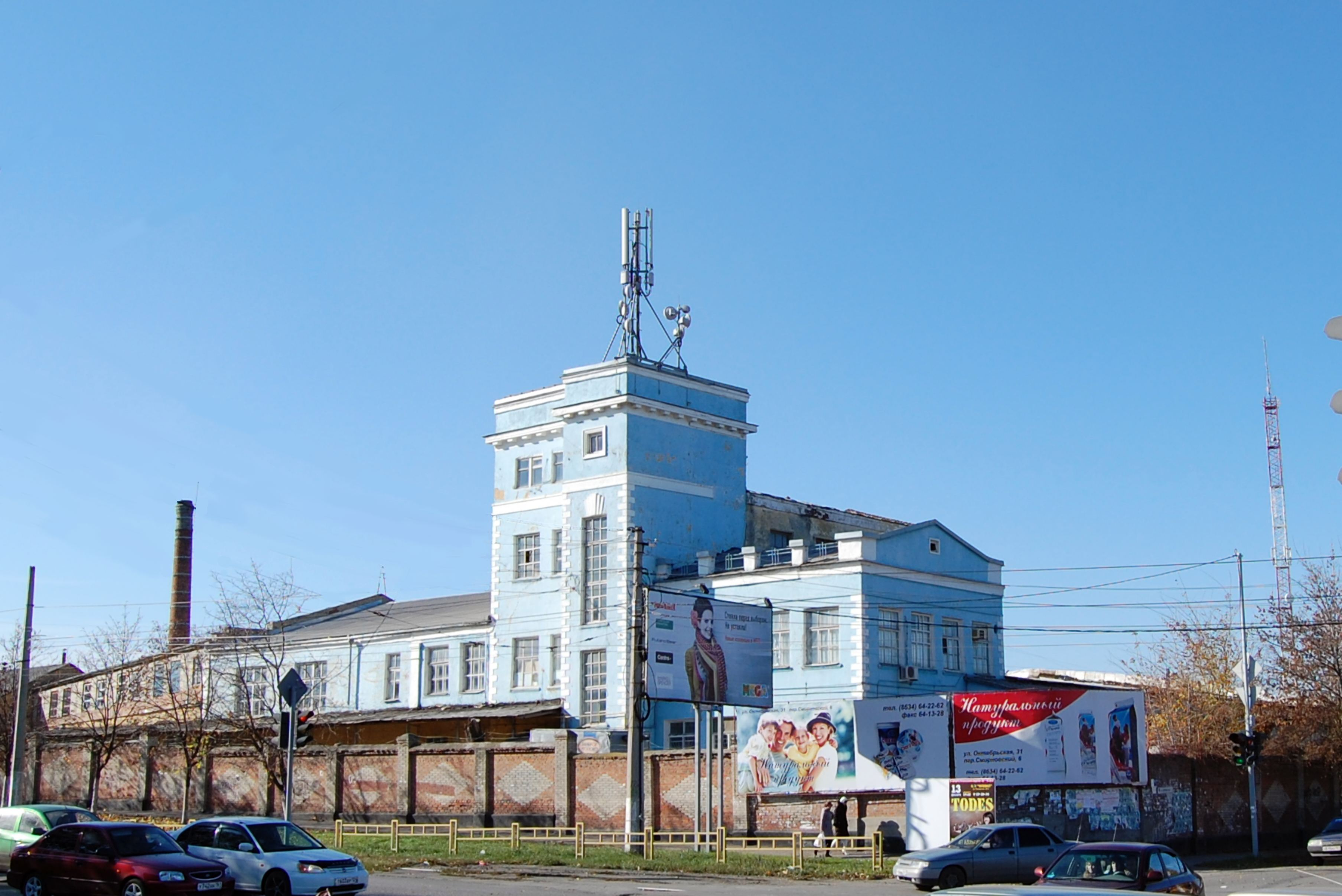 ОАО "Таганрог-Молоко", вид с перекрестка пер. Смирновский / ул. Октябрьская